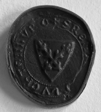 Pečeť Raimunda z Lichtenburka